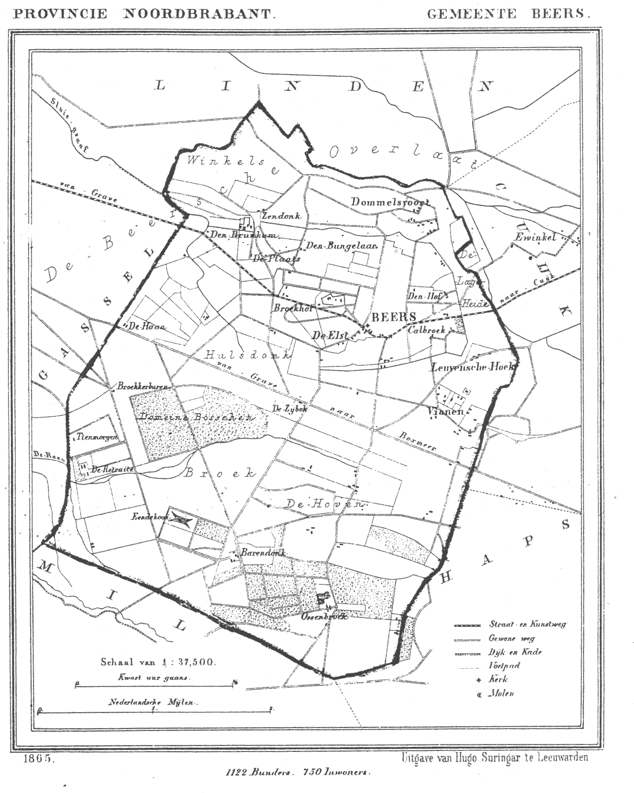 Nederland, Noord-Brabant, Gemeente Beers